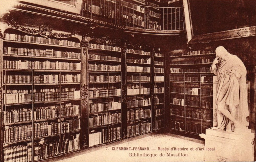 Boiseries de la Bibliothèque de l'évêque Jean Baptiste Massillon (avec la galerie) installées dans le couvent des Charitains, première localisation de la Bibliothèque municipale de Clermont. On voit la statue de Blaise Pascal en marbre blanc par Ramey père, et le bas de deux grands tableaux dont un est de Th. Chassériau. Carte postale n° 7 de l'album de 12 cartes postales "Musée d'histoire et d'art local". Clermont-Ferrand / Musée du Ranquet ; Manufacture française des pneumatiques Michelin. Clermont-Ferrand : impr. par la Société anonyme du Moniteur du Puy de Dôme et des Imprimeries G. Mont-Louis, 1905.